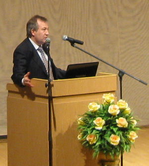 Геннадий Яковлевич Красников — академик Российской академии наук на 45-летии МИЭТ